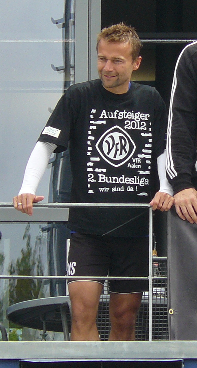 Michael Schiele bei der Aufstiegsfeier des VfR Aalen am 5. Mai 2012